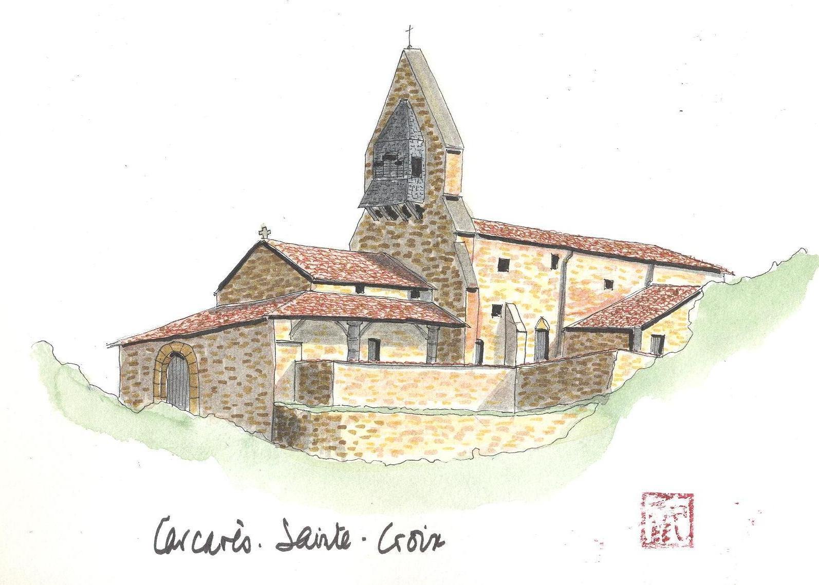 Aquarelle de l'église Carcarès-Sainte-Croix dans le département français des Landes.